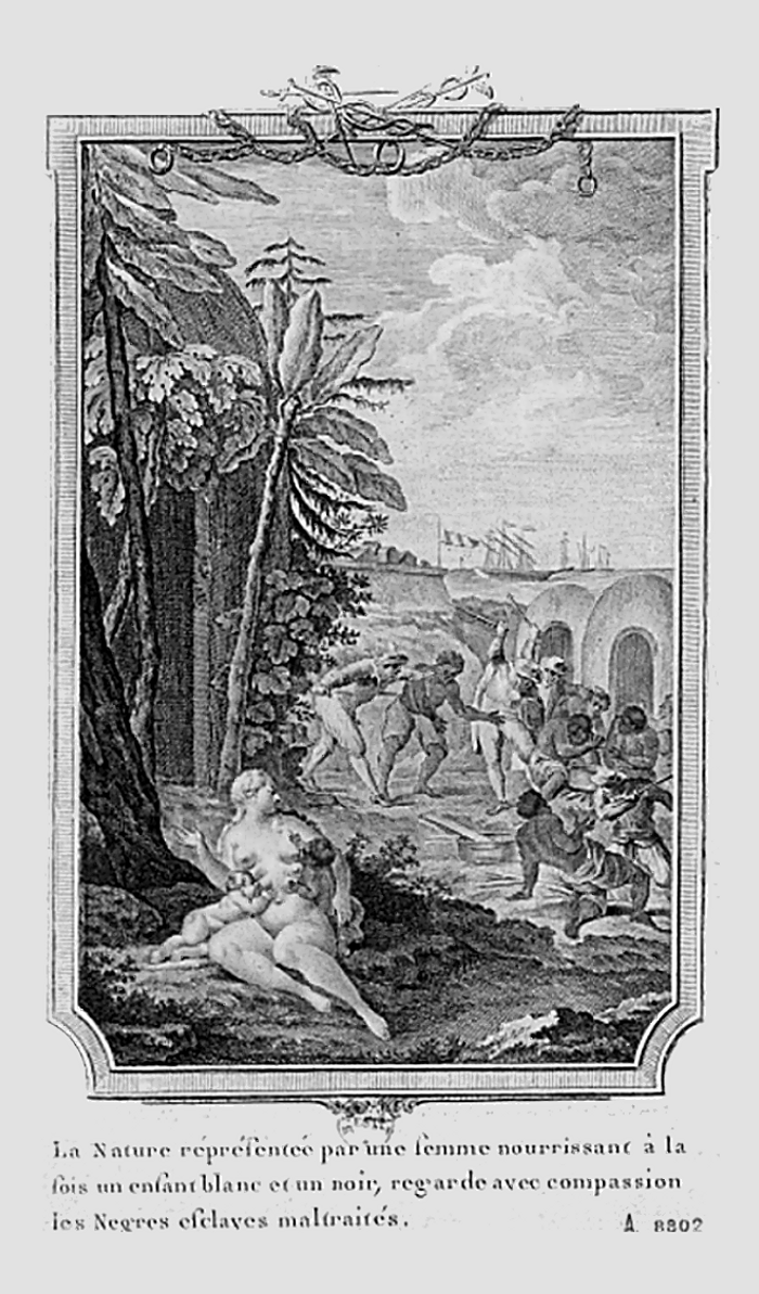 La Nature représentée par une femme nourrissant à la fois un enfant blanc et un noir regarde avec compassion les Nègres esclaves maltraités, XVIIIe siècle. Illustration de l’Histoire des deux Indes de l’abbé Raynal.